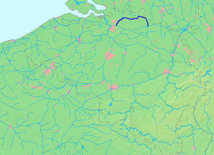 Description : location of a waterway in Belgium Author : edited by Boerkevitz based on Source : Image:MapBelgianWater.PNG on Wikimedia Commons